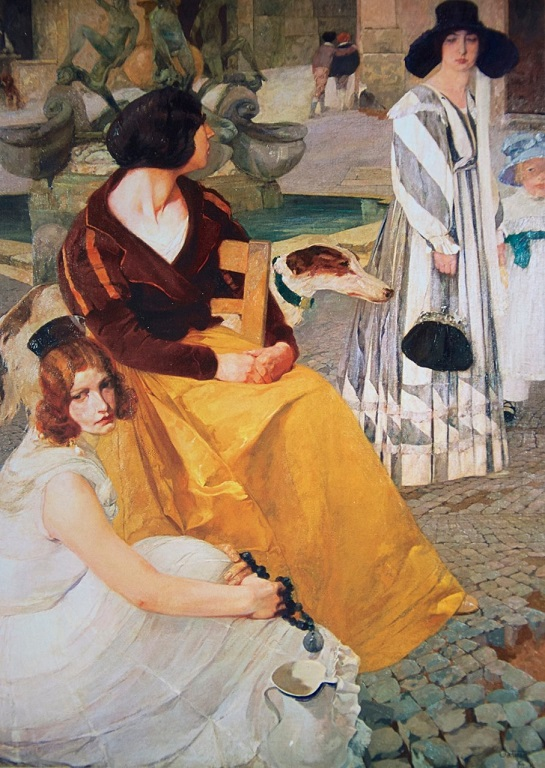 “Scene di vita romana. La fontana delle tartarughe”, olio su tela